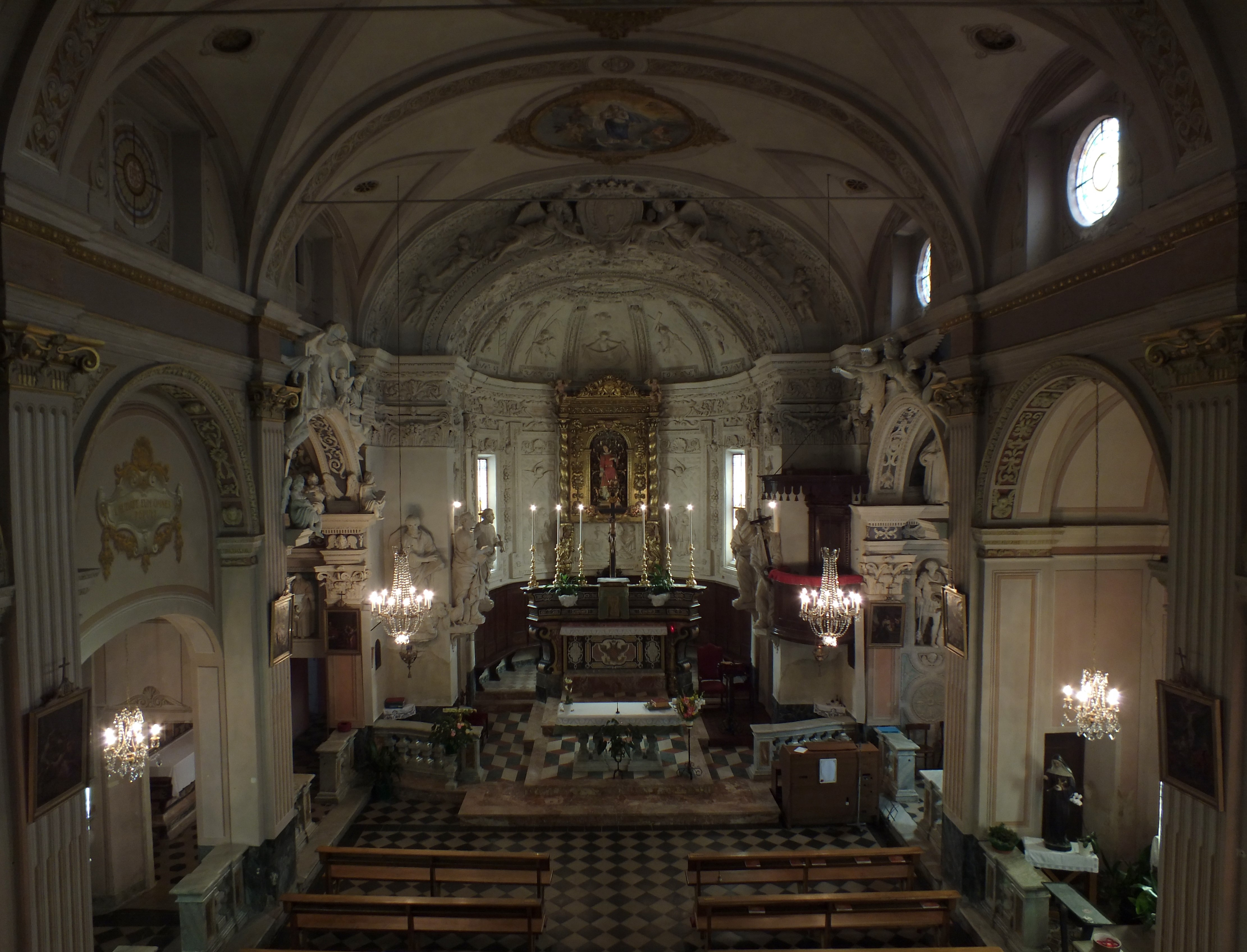 Chiesa parrocchiale di San Lorenzo This is a photo of a monument which is part of cultural heritage of Italy.